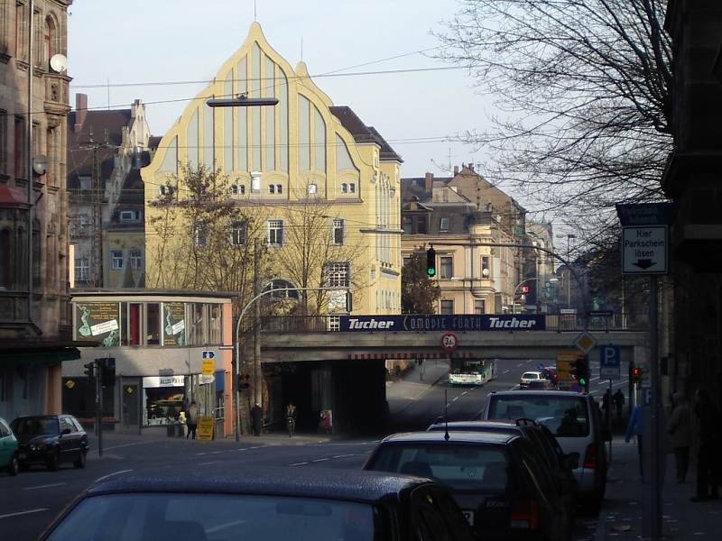 Fürth, Schwabacher Straße, Berolzheimerianum von SSO (2004-01-24); groß (800px). / Im Mittelgrund die Bahnbrücke.